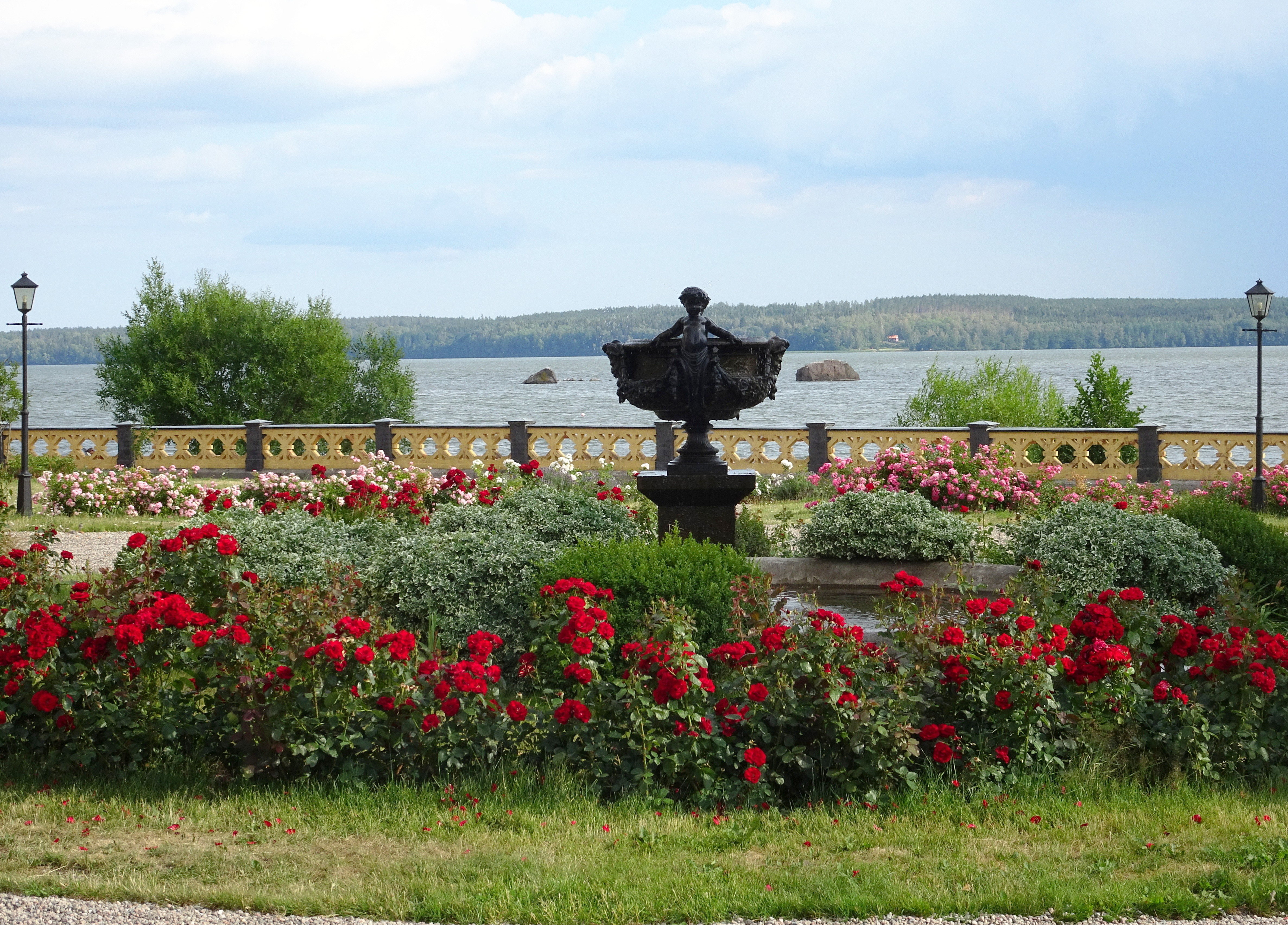 Stora Sundby slott, trädgård vid entrén